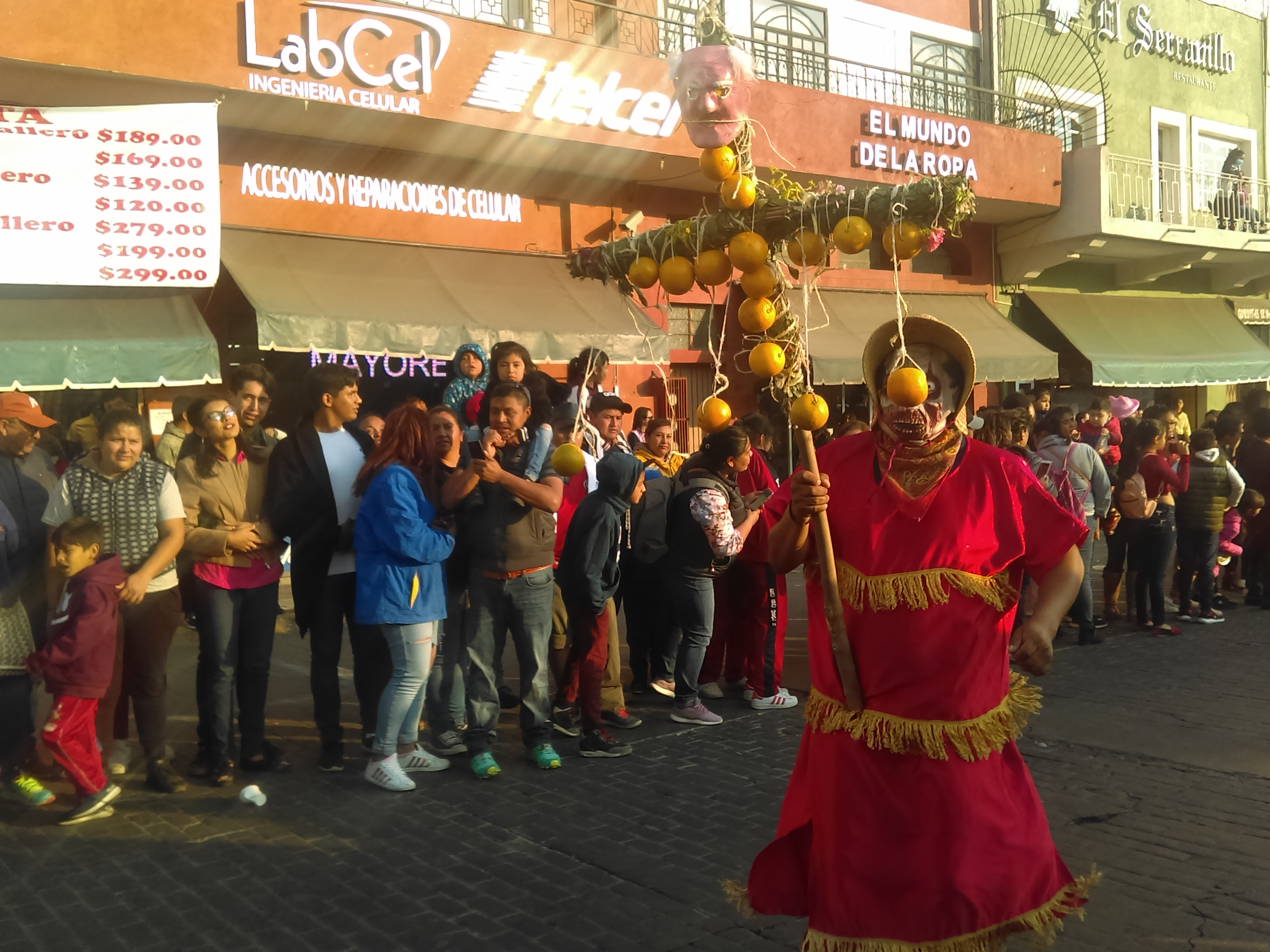 Desfile "Magia de los Carnavales de Hidalgo" en Pachuca de Soto (2020).